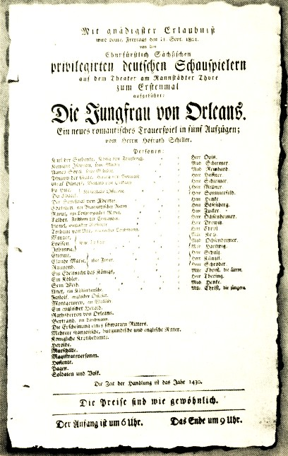 Theaterzettel der Uraufführung von Schillers Jungfrau von Orléans 11. September 1801.